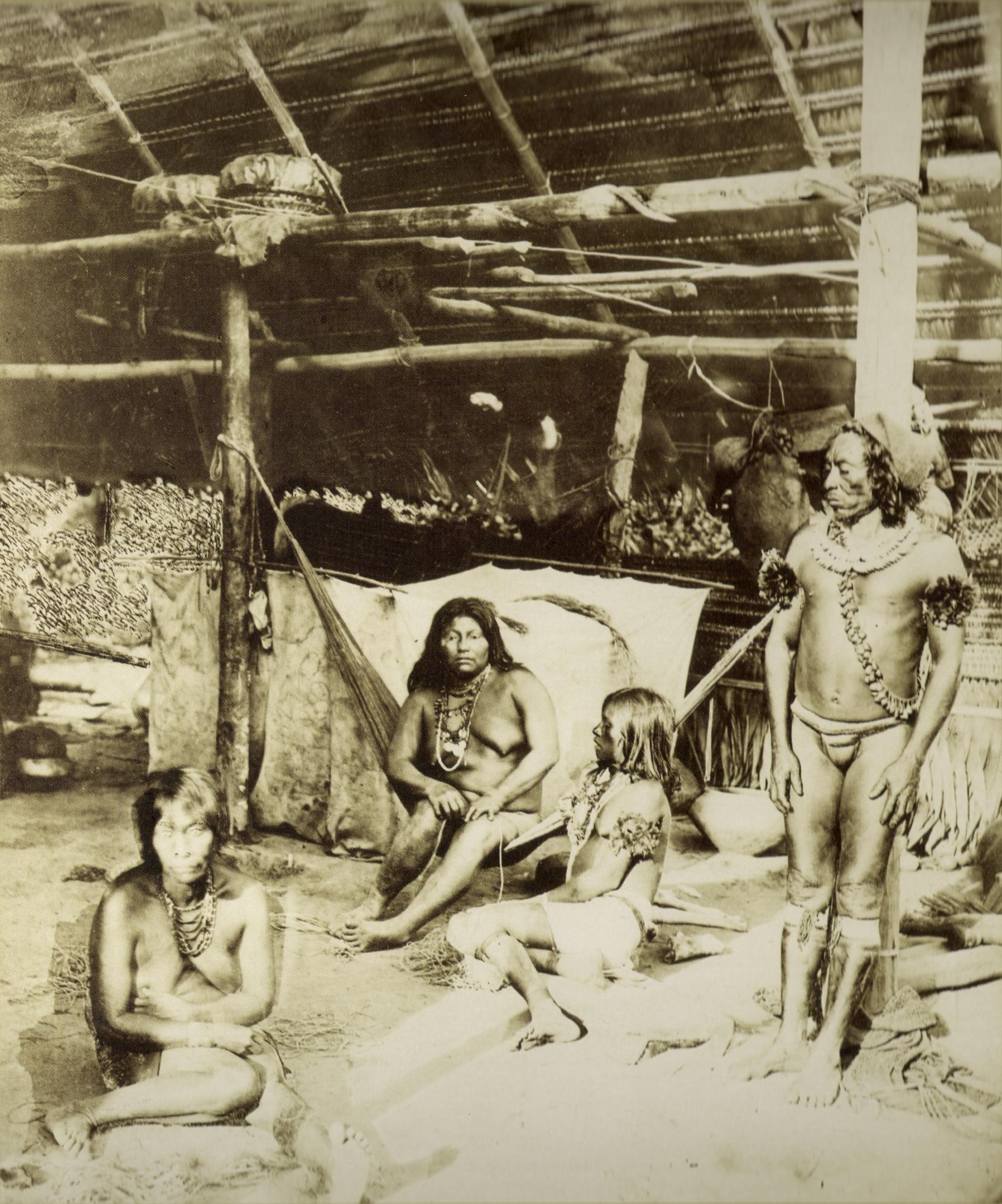 Índios da tribo Ticuna da região do Rio Caldeirão na província do Amazonas, c.1865.